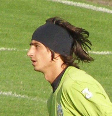 Jurij Martystschuk - ukrainischer Fußballspieler